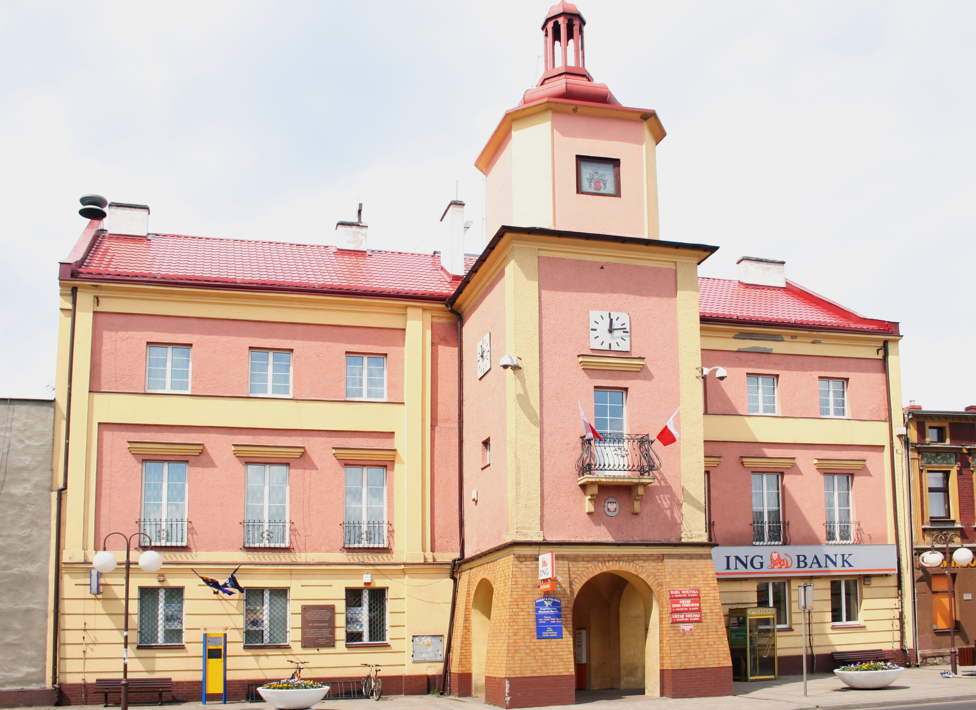 Ratusz w Miasteczku Śląskim, Polska, województwo śląskie, powiat tarnogórski